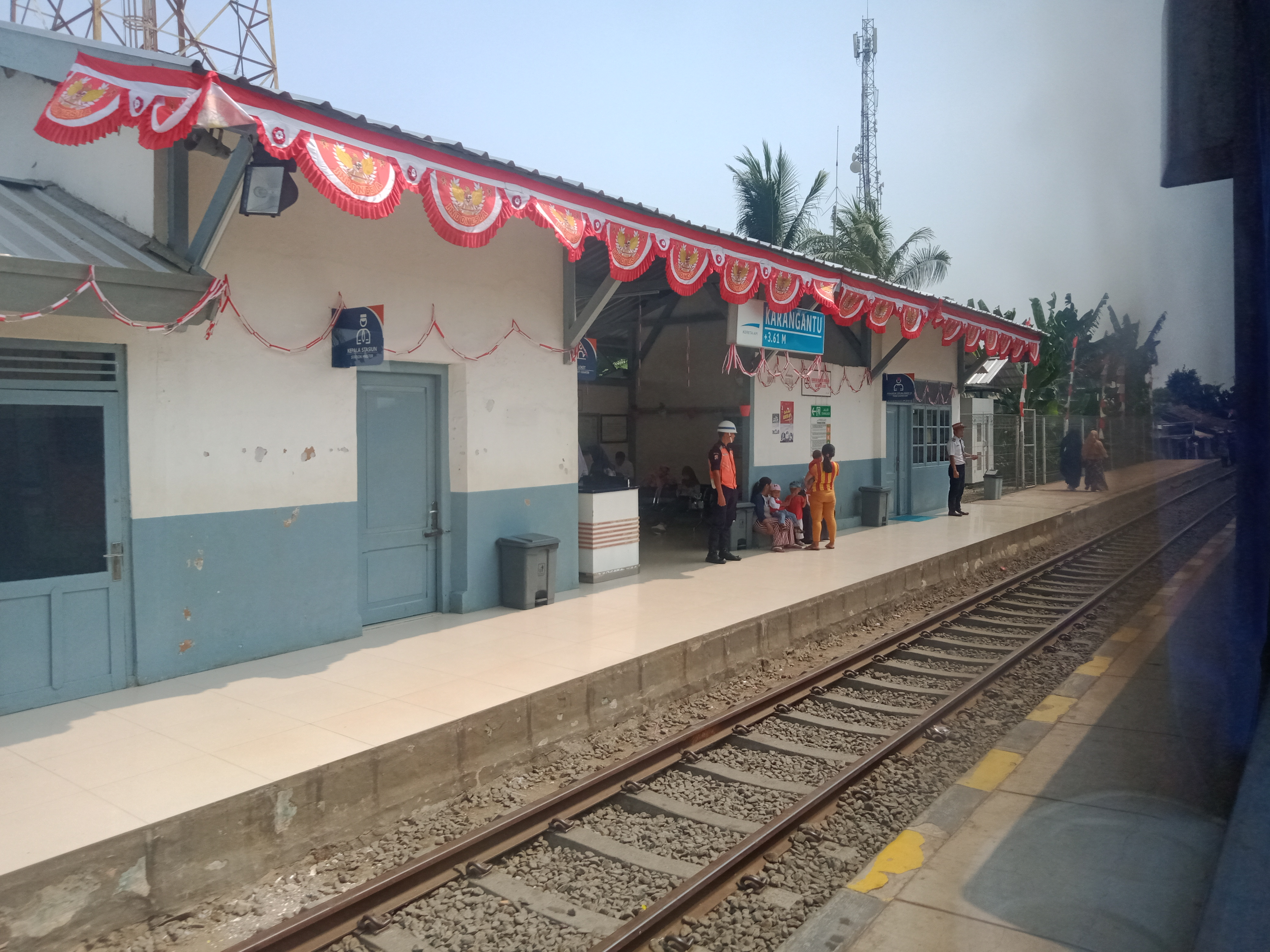 Stasiun Karangantu, 2019